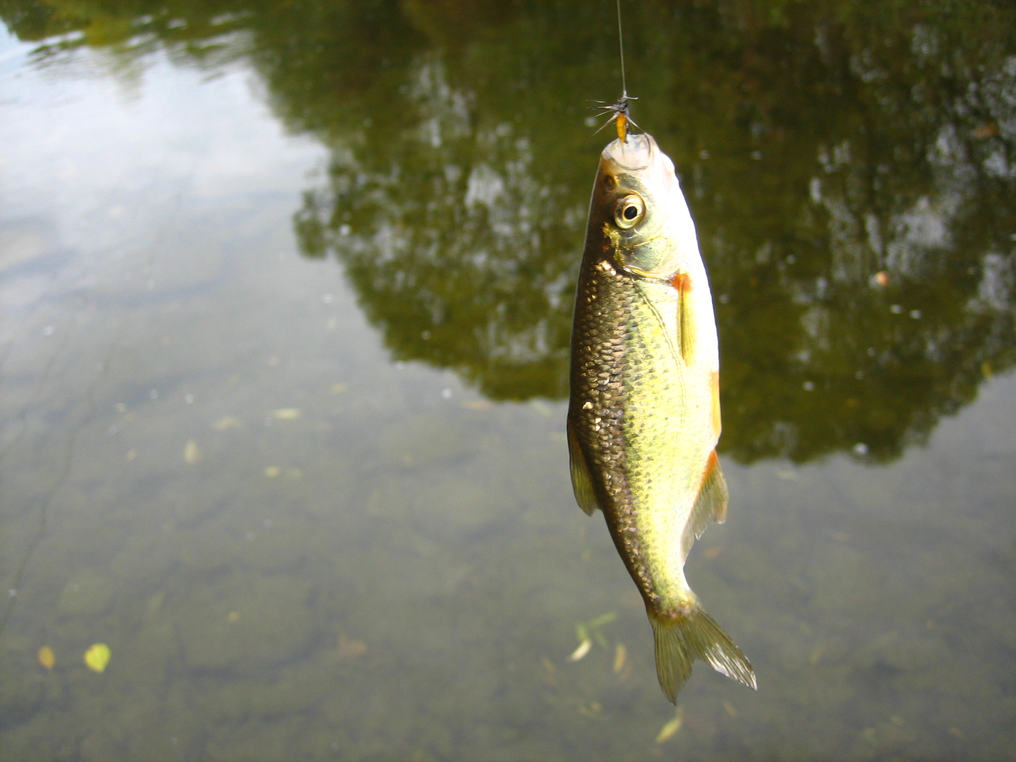 Ouklejka pruhovaná